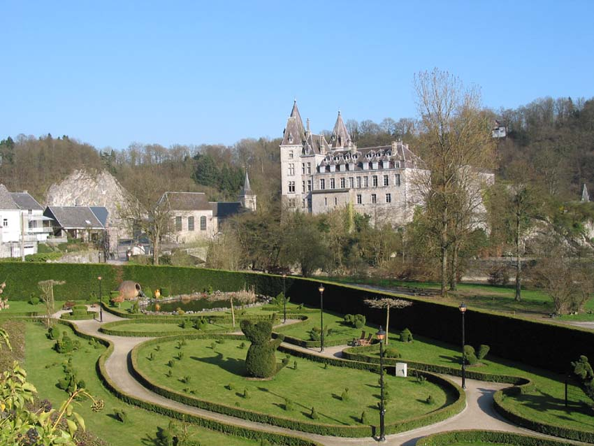 Durbuy, de kleinste stad van België.